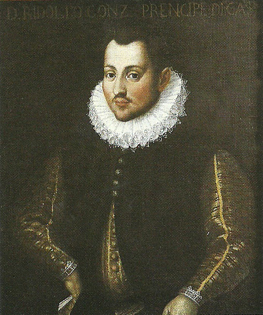 Ritratto di Rodolfo Gonzaga 1569-1593.